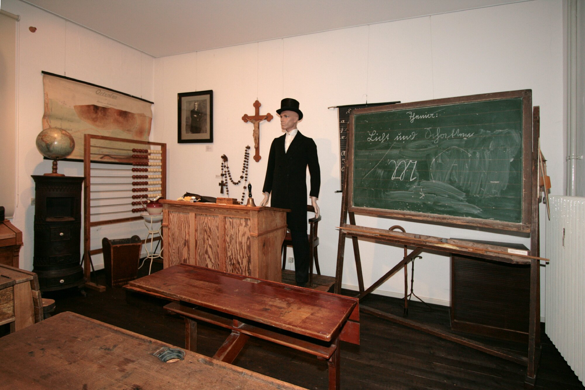 Klassentimmer im Museum der Stadt Lenneststadt